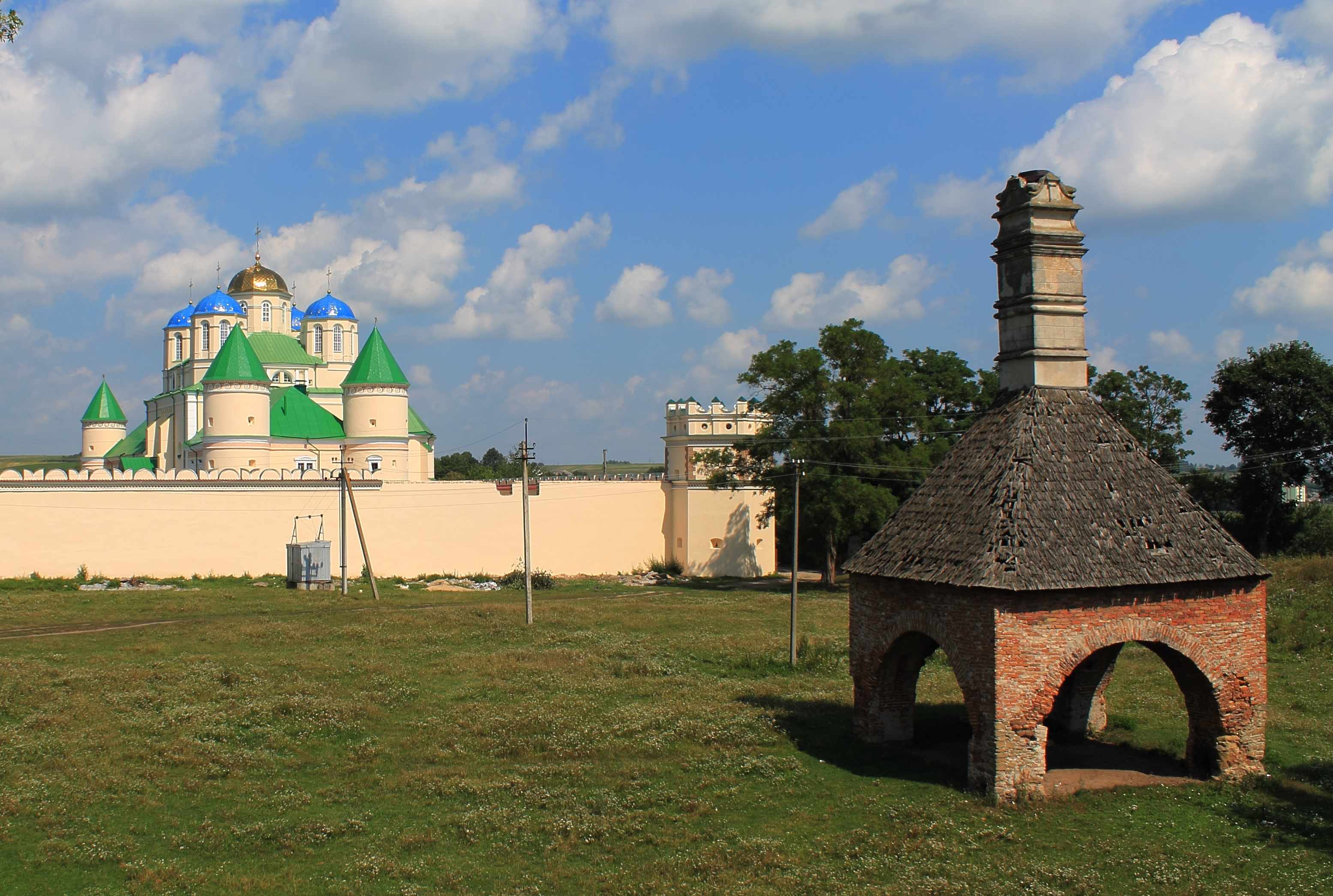 Піч (мур.), с.Межиріч